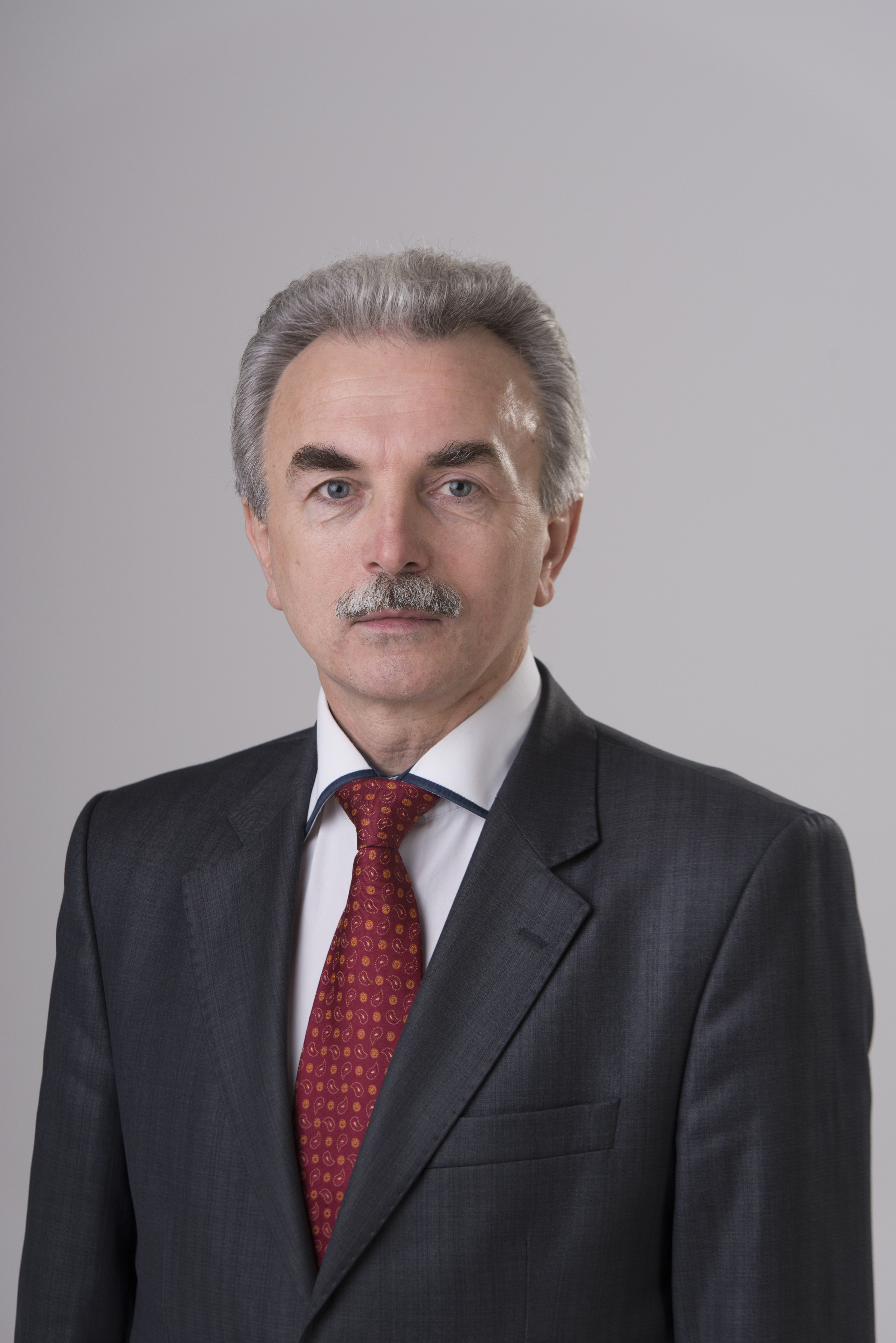 2014.gada 9.decembris. 12.Saeimas deputāts Gunārs Kūtris. Foto: Reinis Inkēns, Saeimas Kanceleja Izmantošanas noteikumi: saeima.lv/lv/autortiesibas